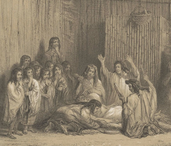 Detalle de Machitún en el Atlas de la Historia Física y Política de Chile, Tomo Primero. Claudio Gay (1854)